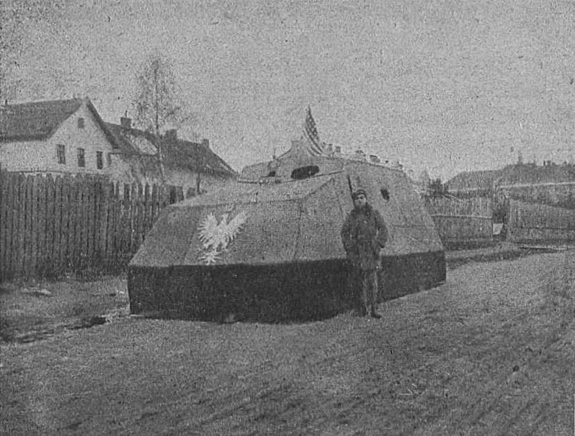 Polski automobil pancerny z obrony Lwowa 1918-19